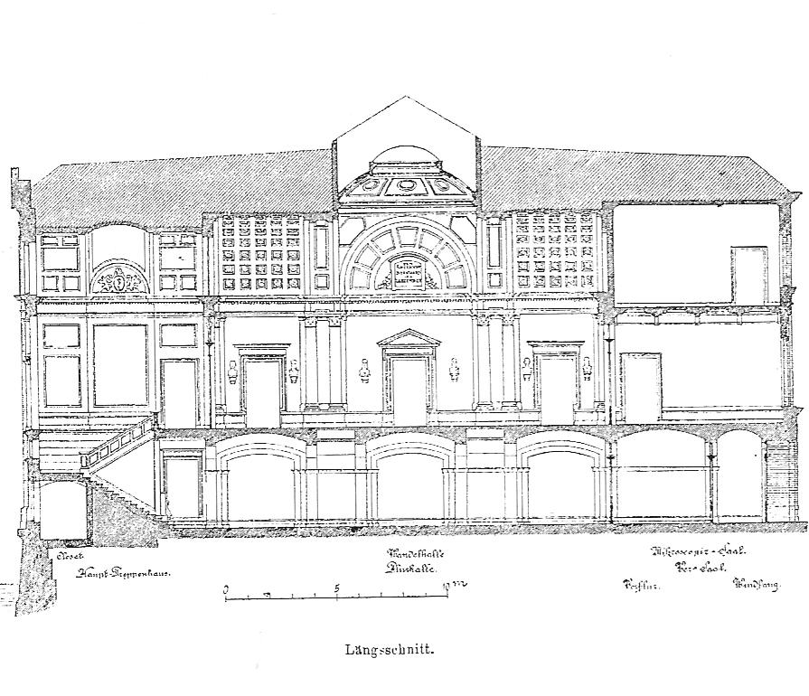 Längsschnittszeichnung des Langenbeck-Hauses in Berlin